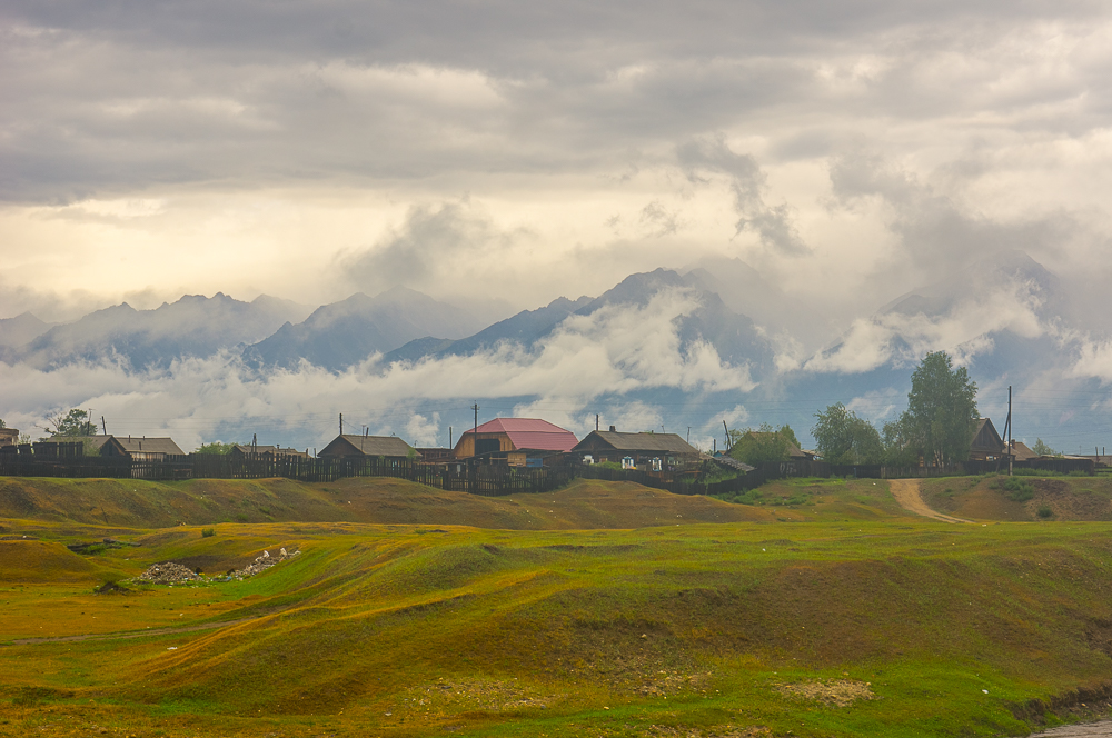 Посёлок Кырен летом 2015 года.